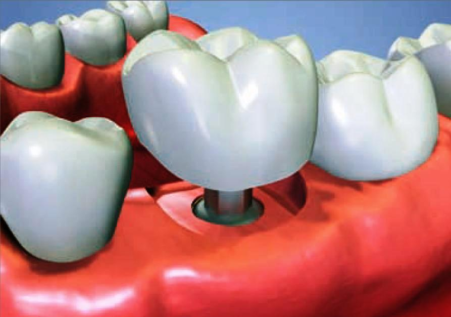 postup implantace4